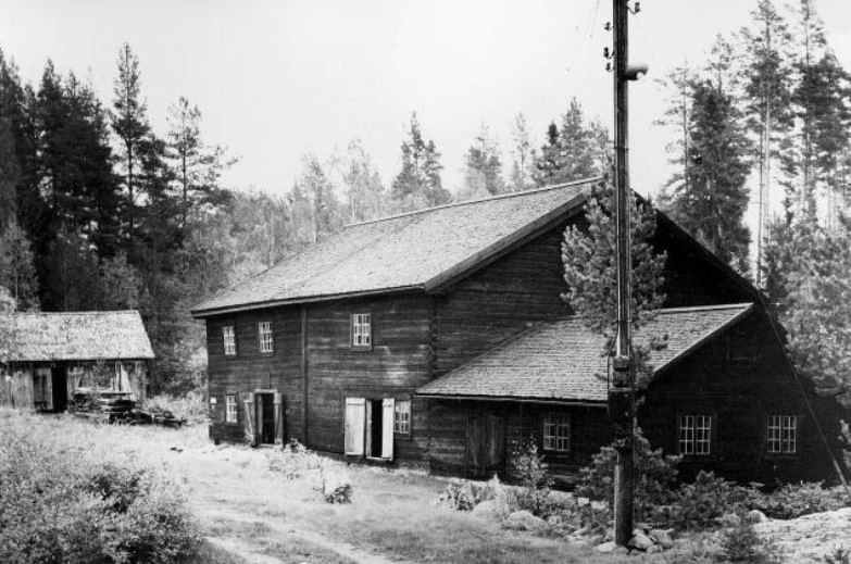 Ösjöfors handpappersbruks fabriksbyggnad 1965